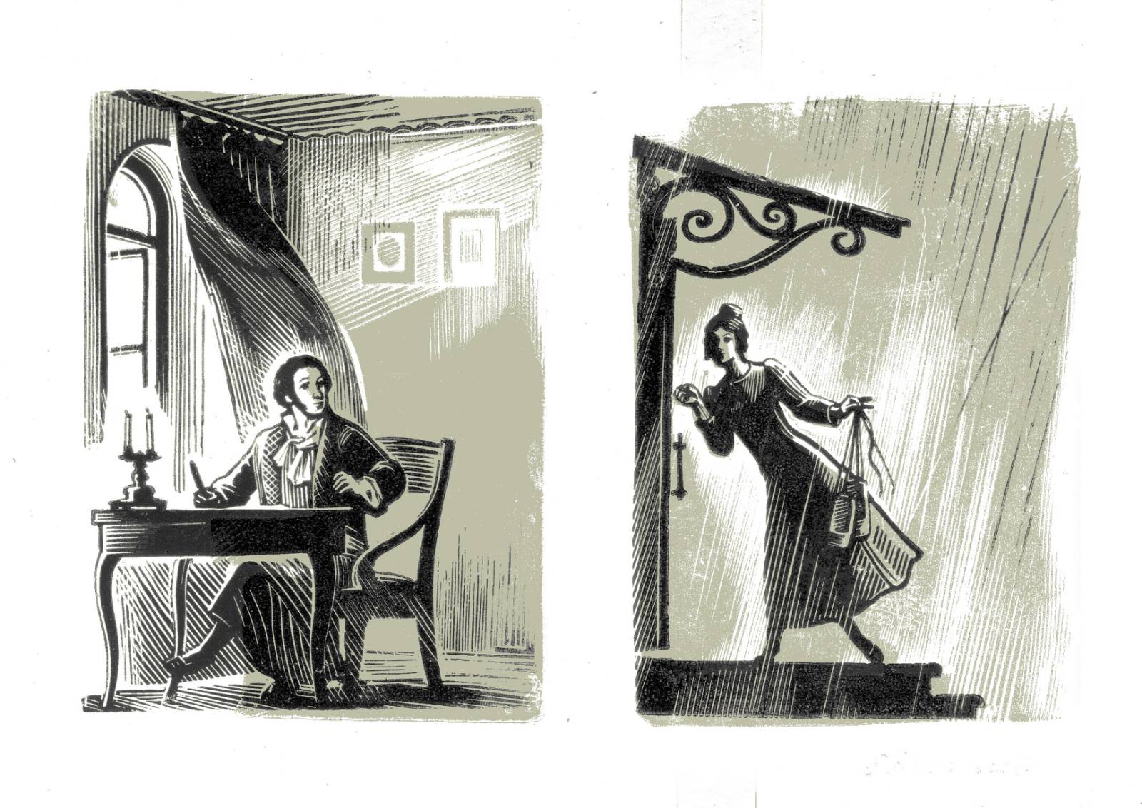 А. С. Бакулевский. Иллюстрация к произведению А.С.Пушкина «Барышня-крестьянка». Бумага, ксилография, 4,5х6,5 см. 1967 г.